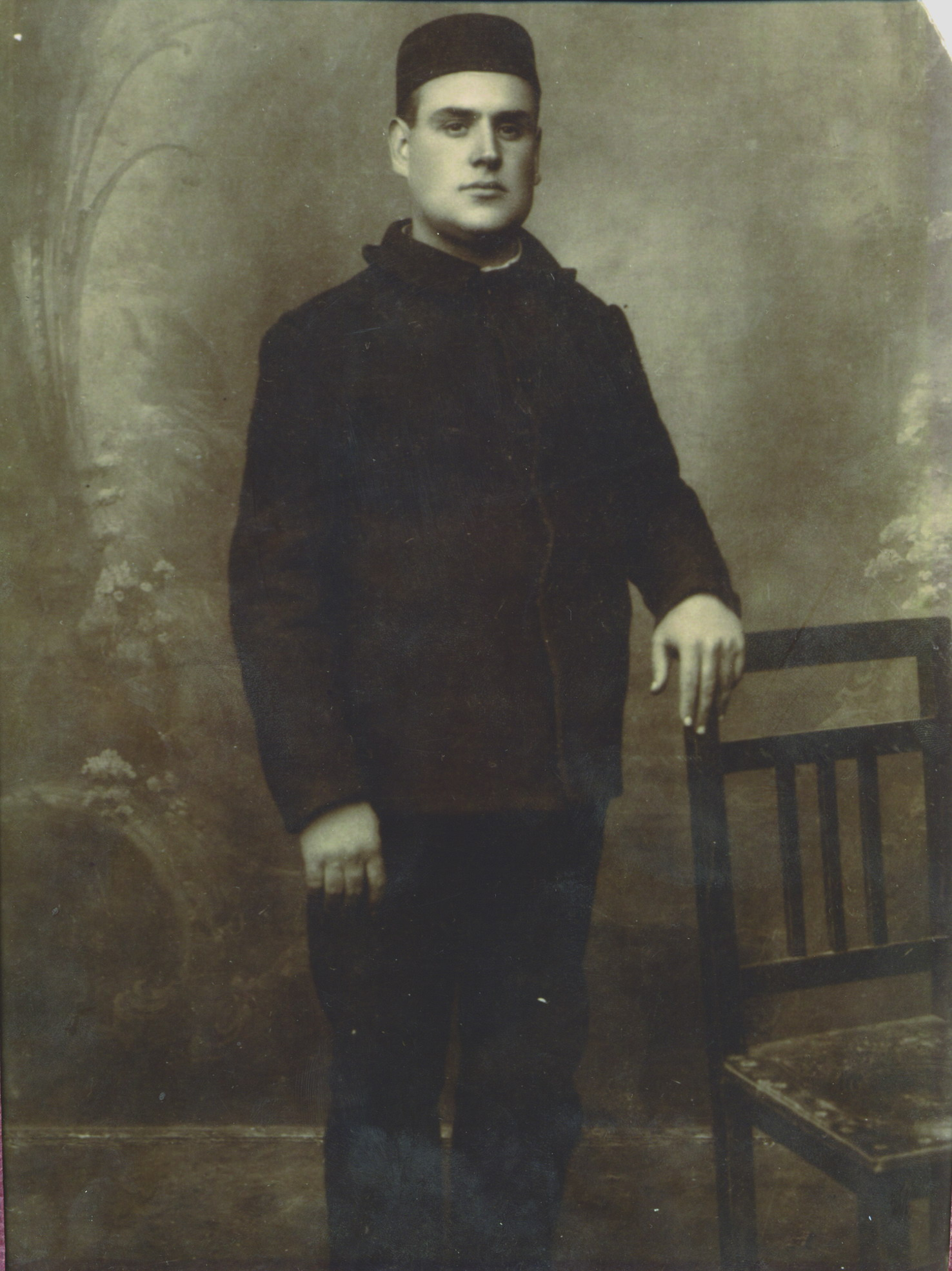 Marcel·lí Perelló, prisoner at Penal del Dueso, Santoña. circa 1929